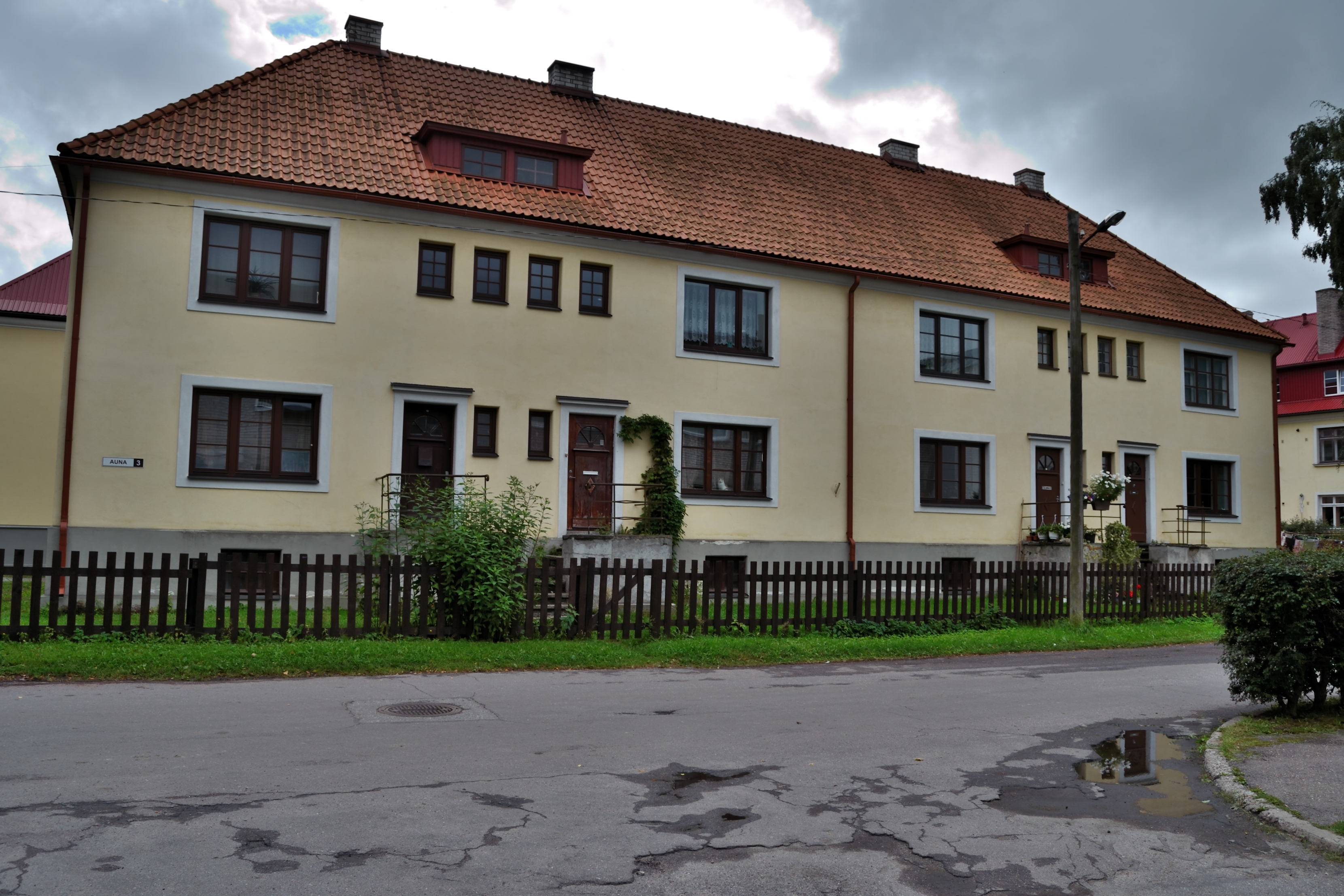 Tallinn, elamu Auna 3, 1929